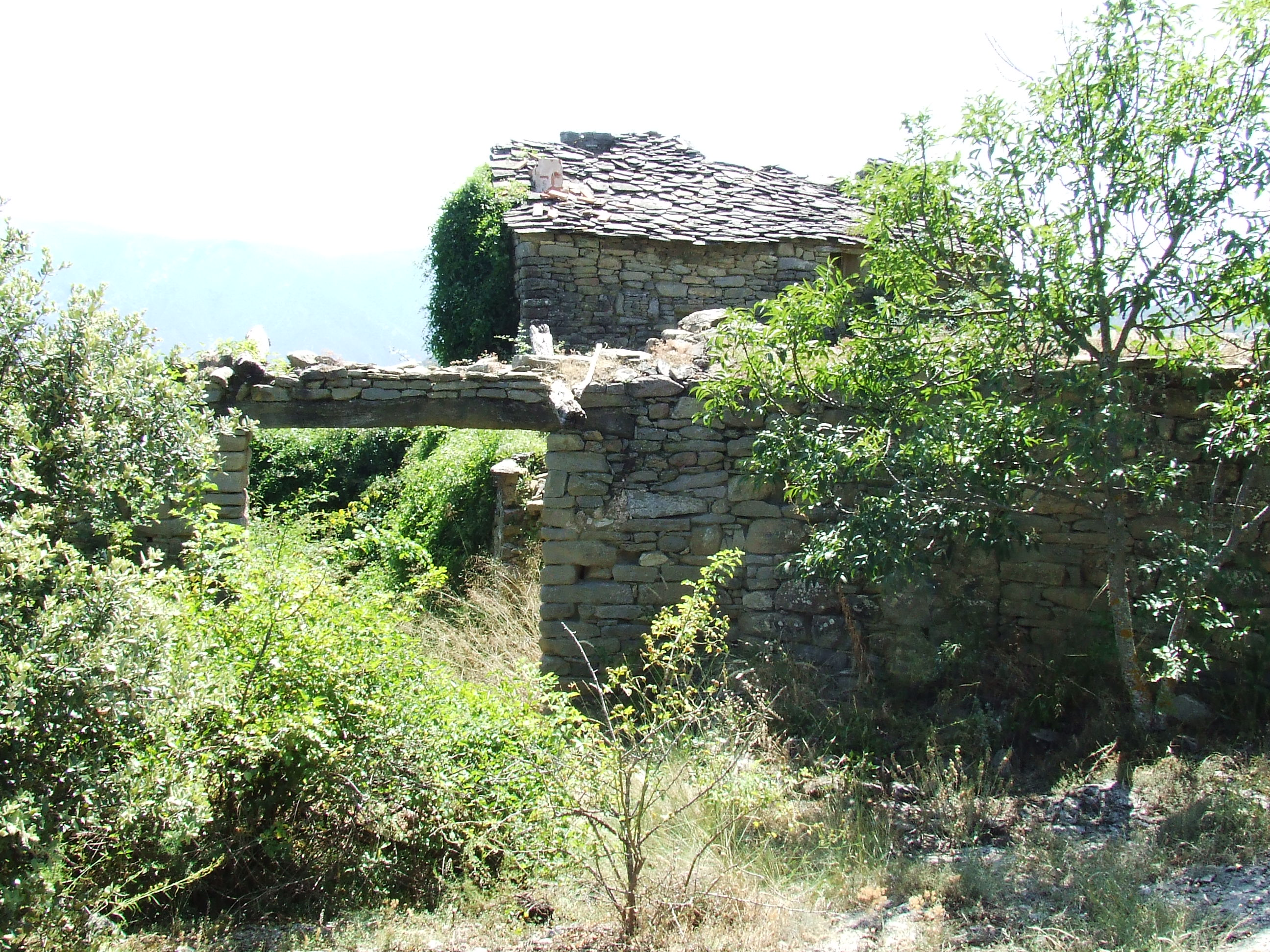 Casa Farmicó (Miravet, Mur, Castell de Mur, Pallars Jussà)